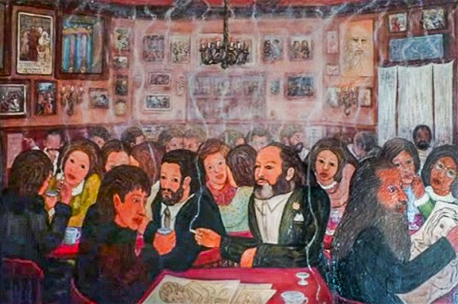 Obra de Constante Gil de la serie Tertulias de Café. Vistas de la Cerveceria Madrid con Progreso y Pepe bebiendo Agua de Valencia.